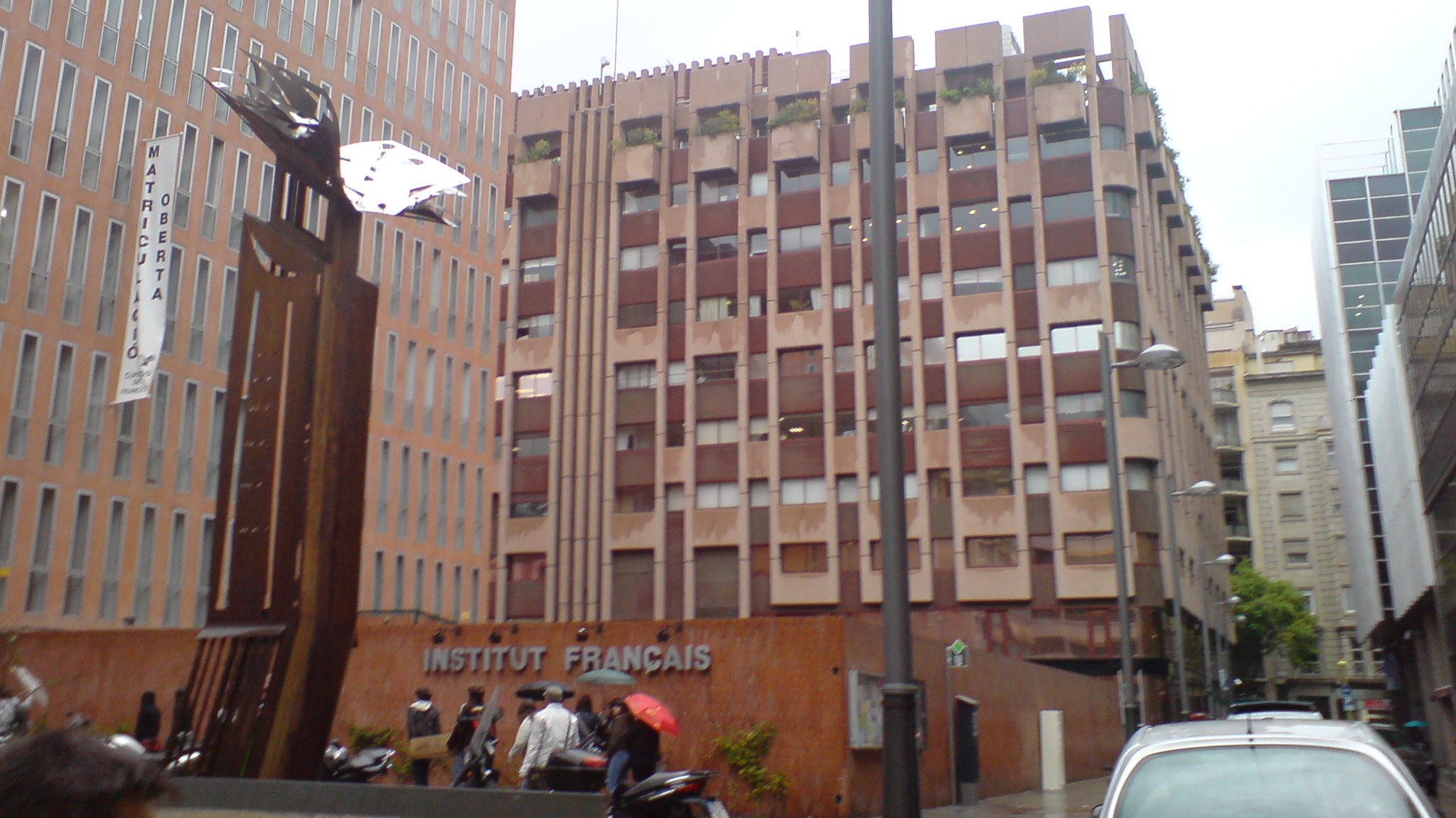 Institut Francès de Barcelona